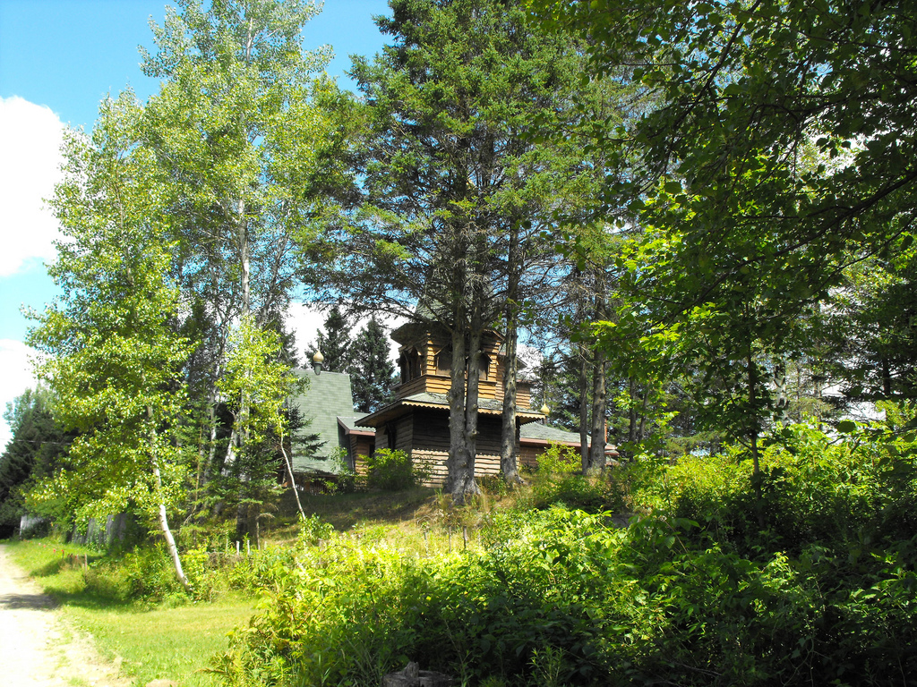 Holy Transfiguration skete in Mansonville. Summer.jpg